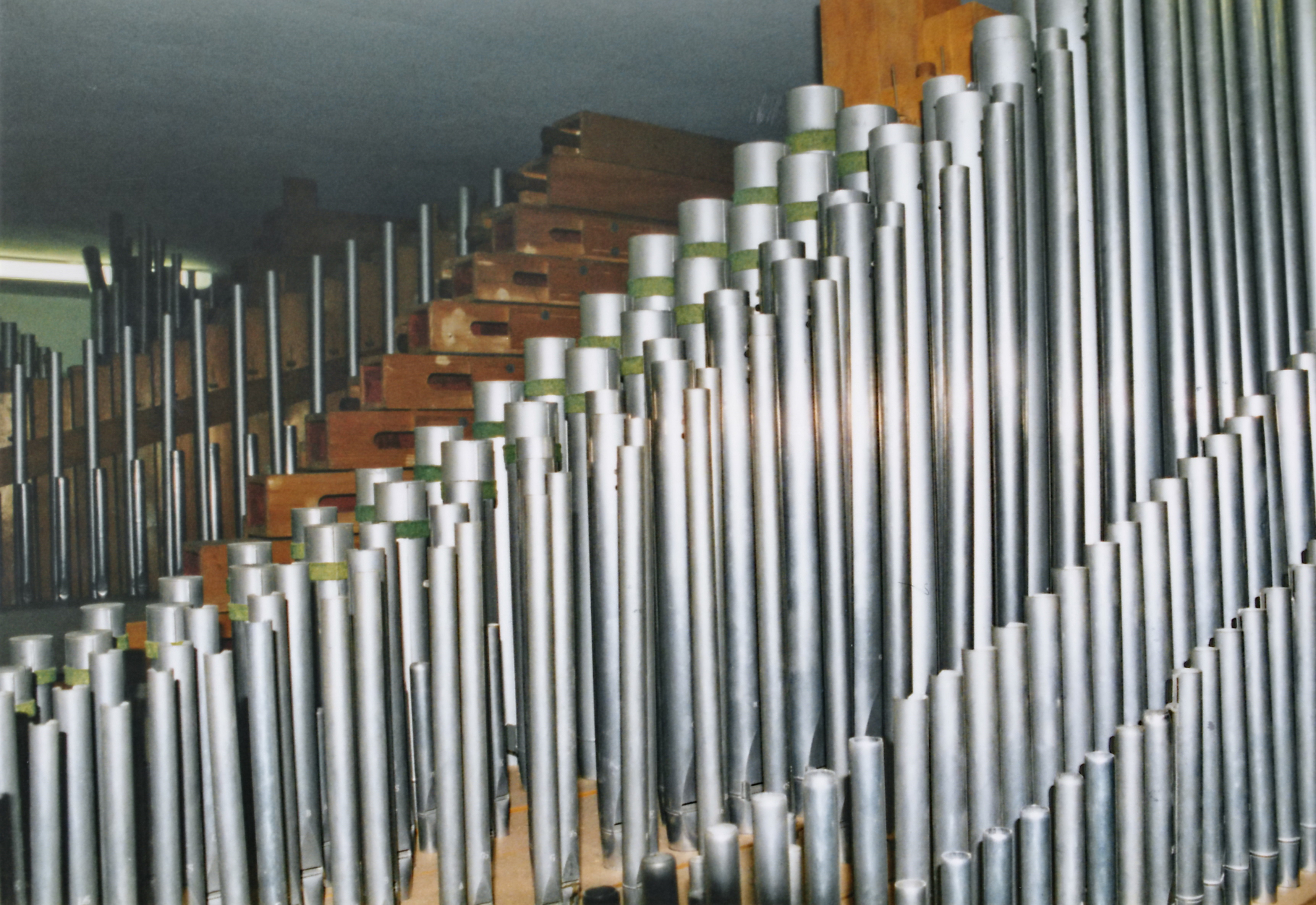 1929 erbaute Orgel der Firma Jehmlich Orgelbau Dresden im Georgius-Agricola-Gymnasium Chemnitz.